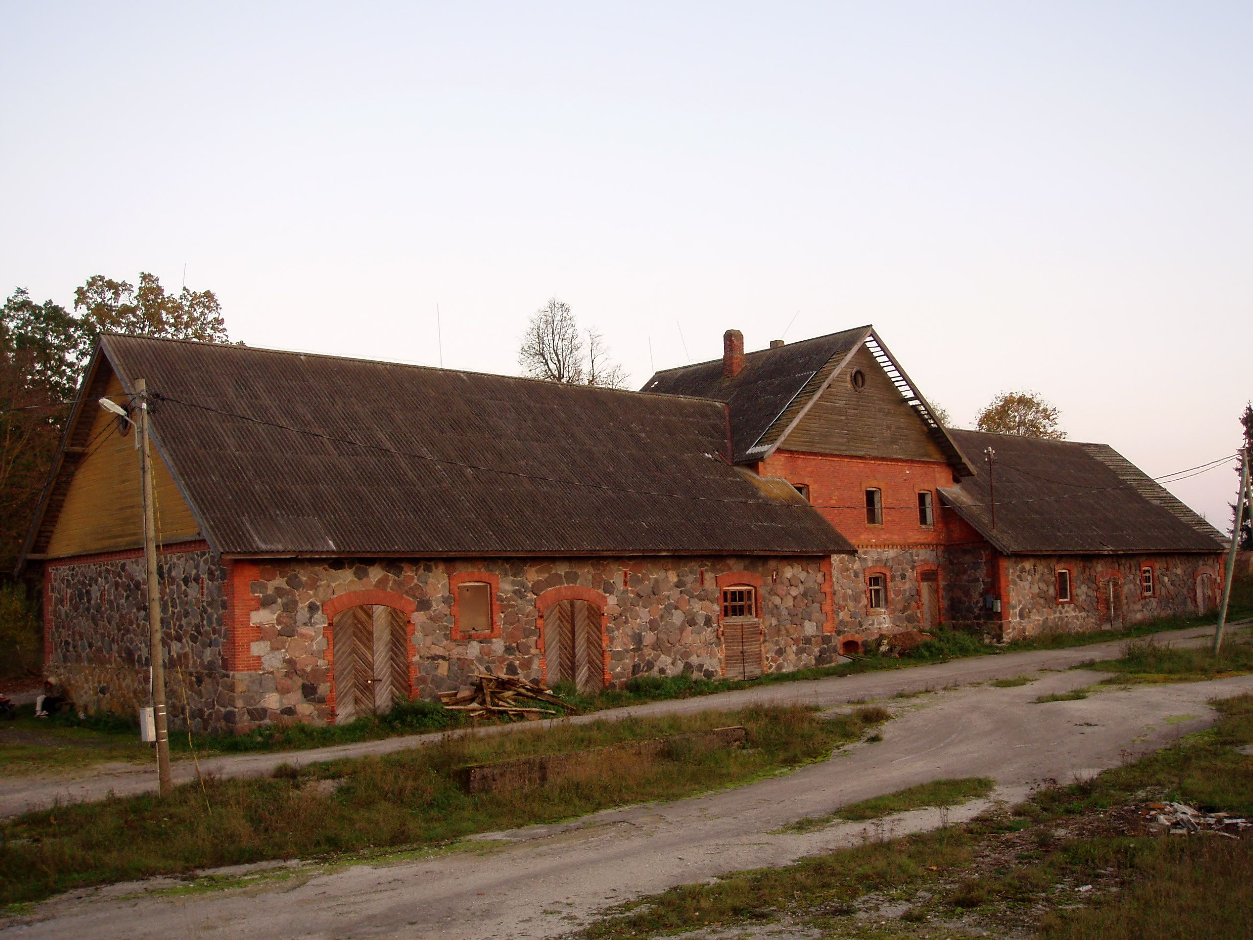 Kärde mõisa ait